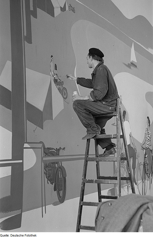 Original image description from the Deutsche Fotothek Dekorationsmaler während des Bemalens einer Wand